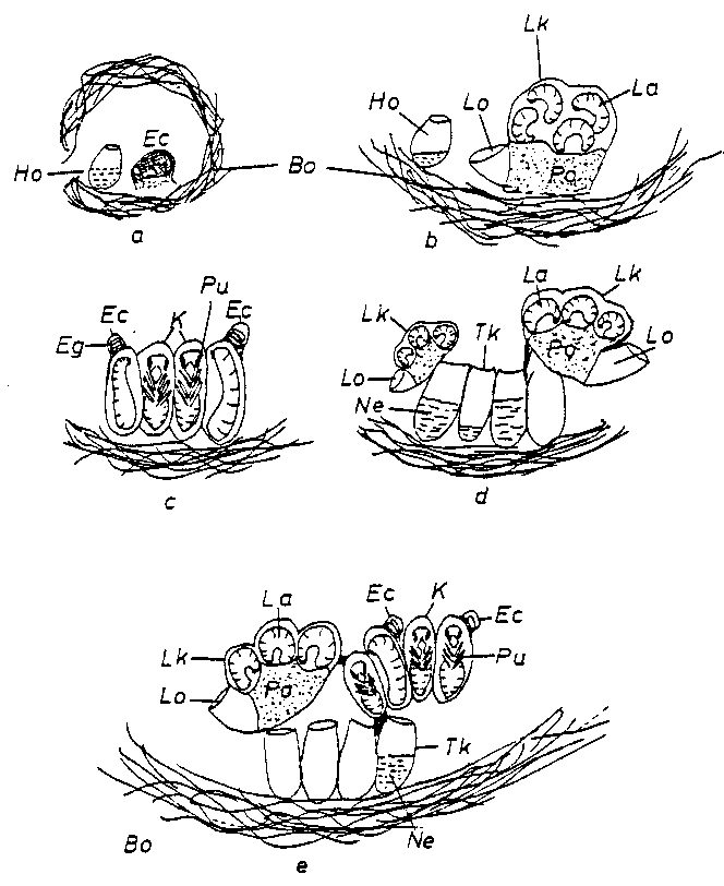 Humler: Skjematisk oversikt over et humlebol. Tegningen er laget av meg. Atle